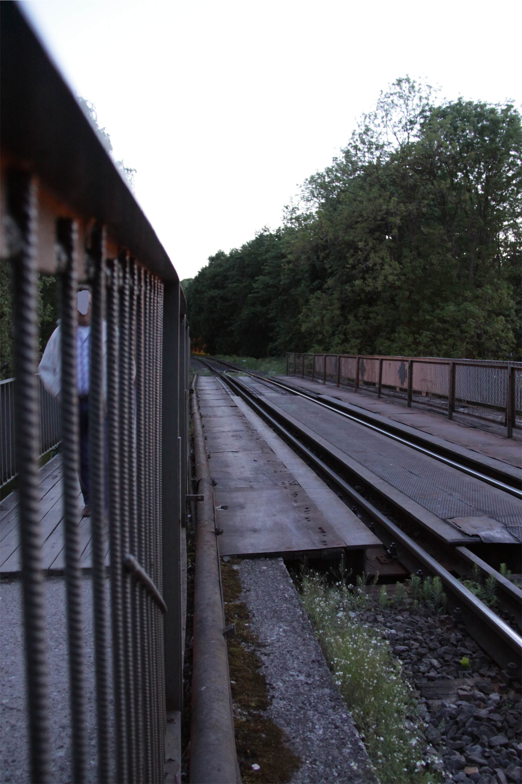 Eisenbahnbrücke Lötzen (Giżycko)